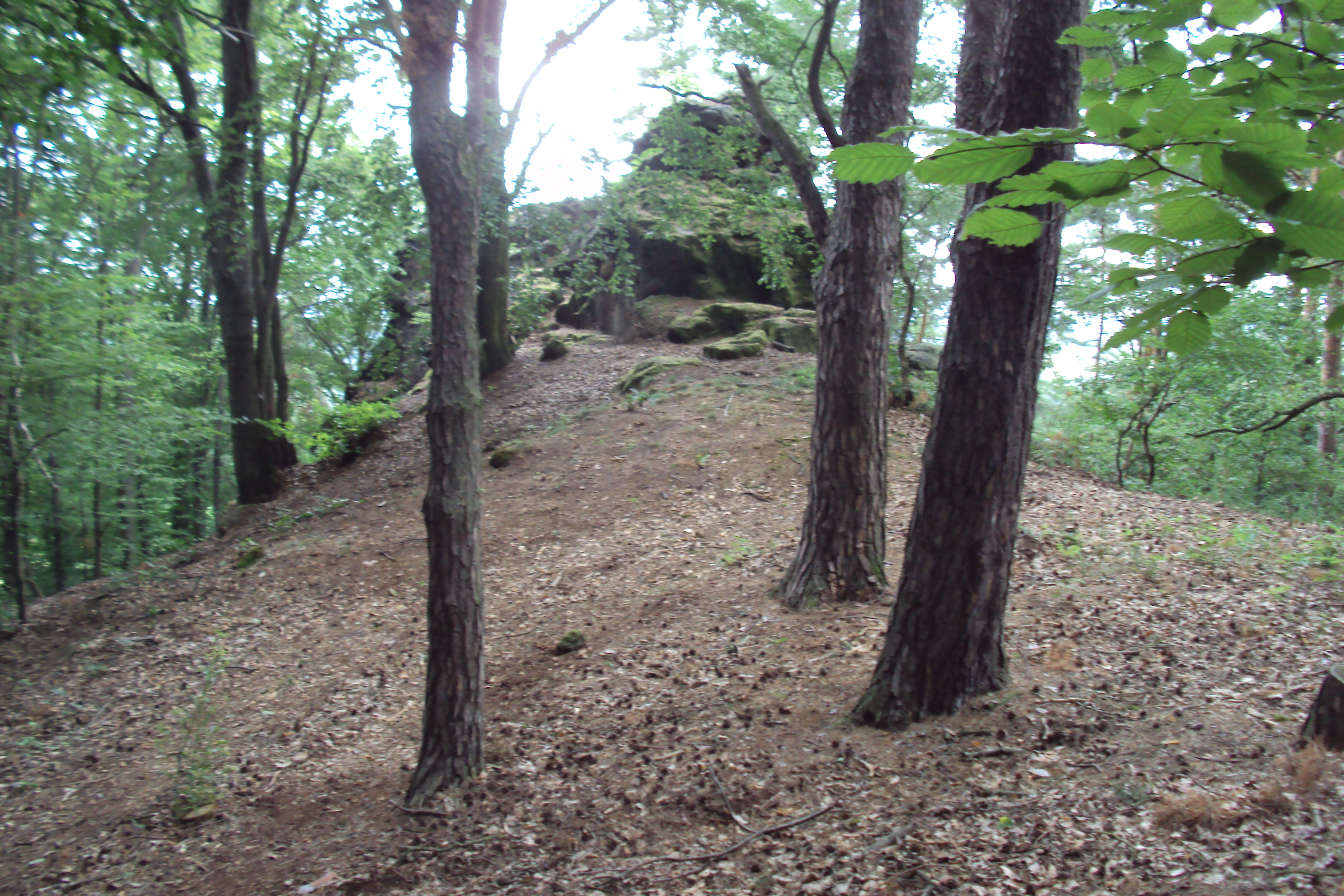 Přírodní památka na Kokořínsku